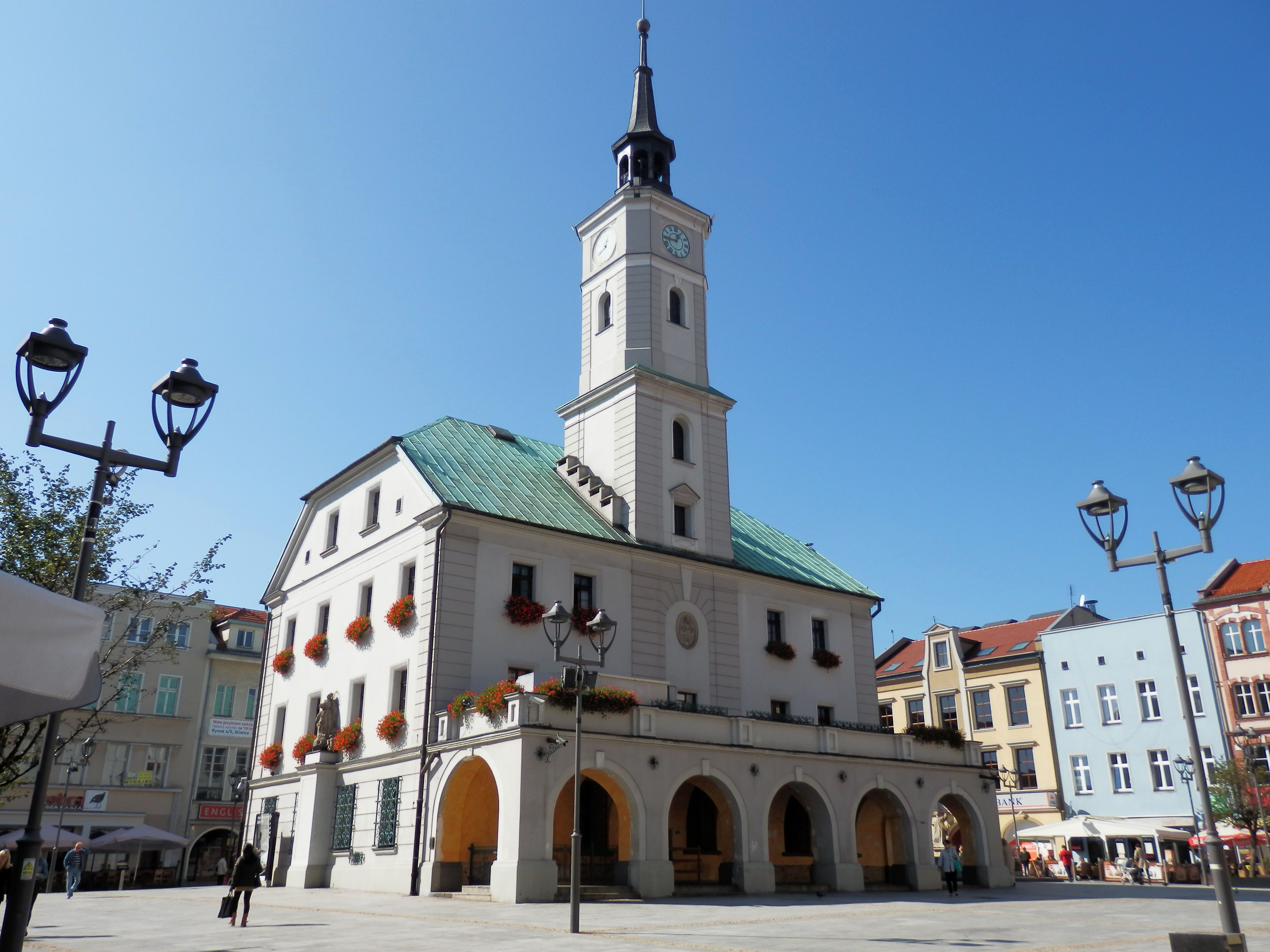 Gliwice, Ratusz z XVIII/XIX wieku, murowany, klasycystyczny, z reliktami z okresu średniowiecza. Granice ochrony obejmują parcelę budowlaną.